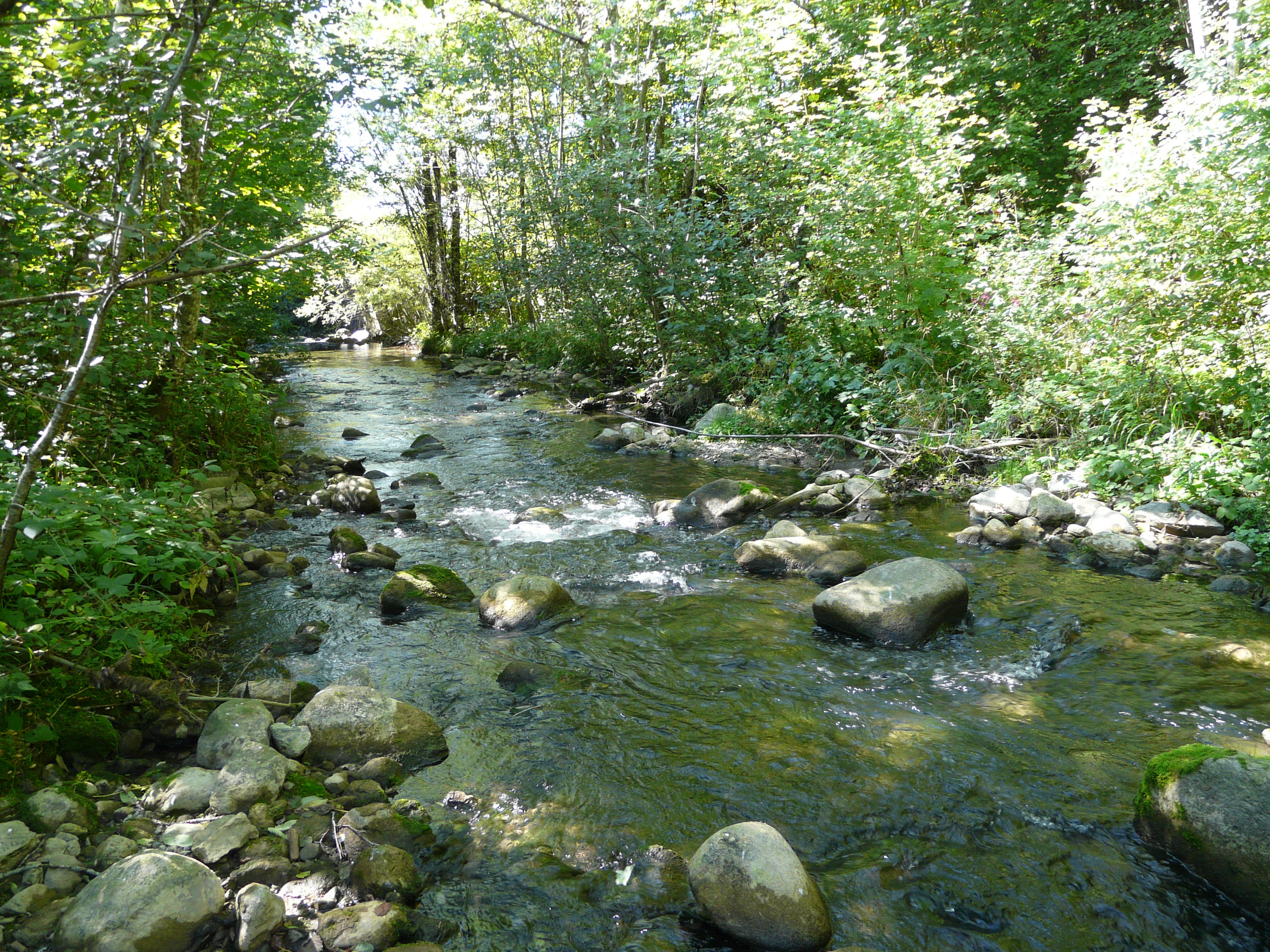 L'Ugine, affluent de la Dranse de Morzine, limite entre les communes de Bernex (rive gauche) et Saint-Paul-en-Chablais (rive droite)